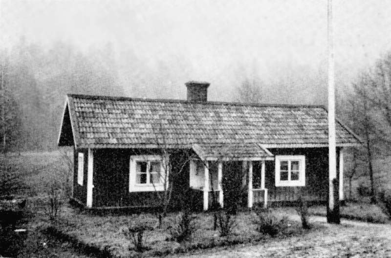 Torpet Hästhagen i Huddinge kommun